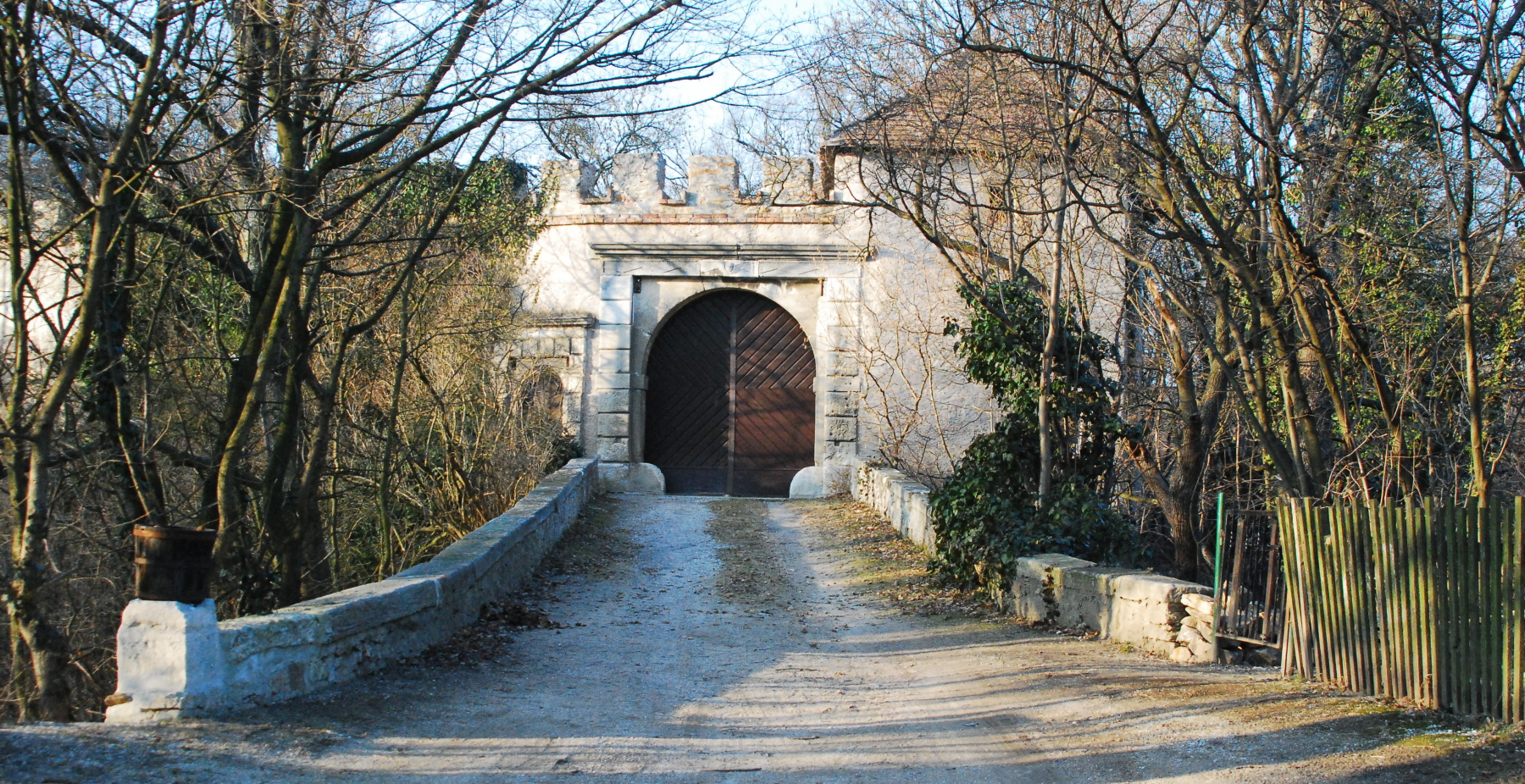 Eingang zur Burg Schleinitz in Burgschleinitz in Niederösterreich